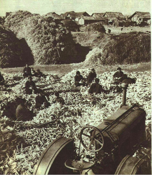 1953年北大荒玉米农场